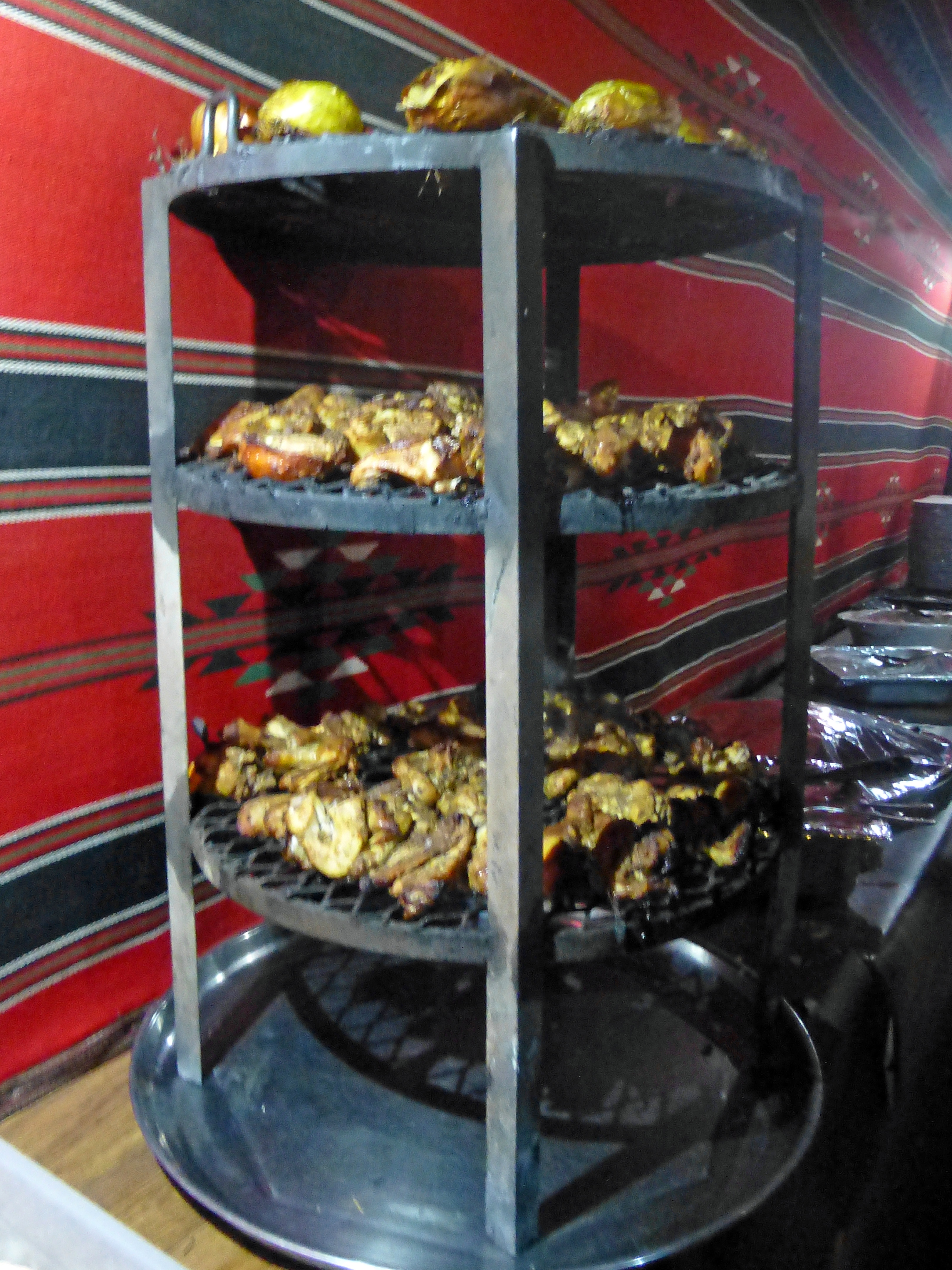 Zarb bédouin préparé dans le désert du Wadi Rum (Jordanie). Viande et légumes emballés dans du papier alu sont placés sur un plat à plusieurs étages, puis enterrés dans le sable. Le tout cuit pendant plusieurs heures.